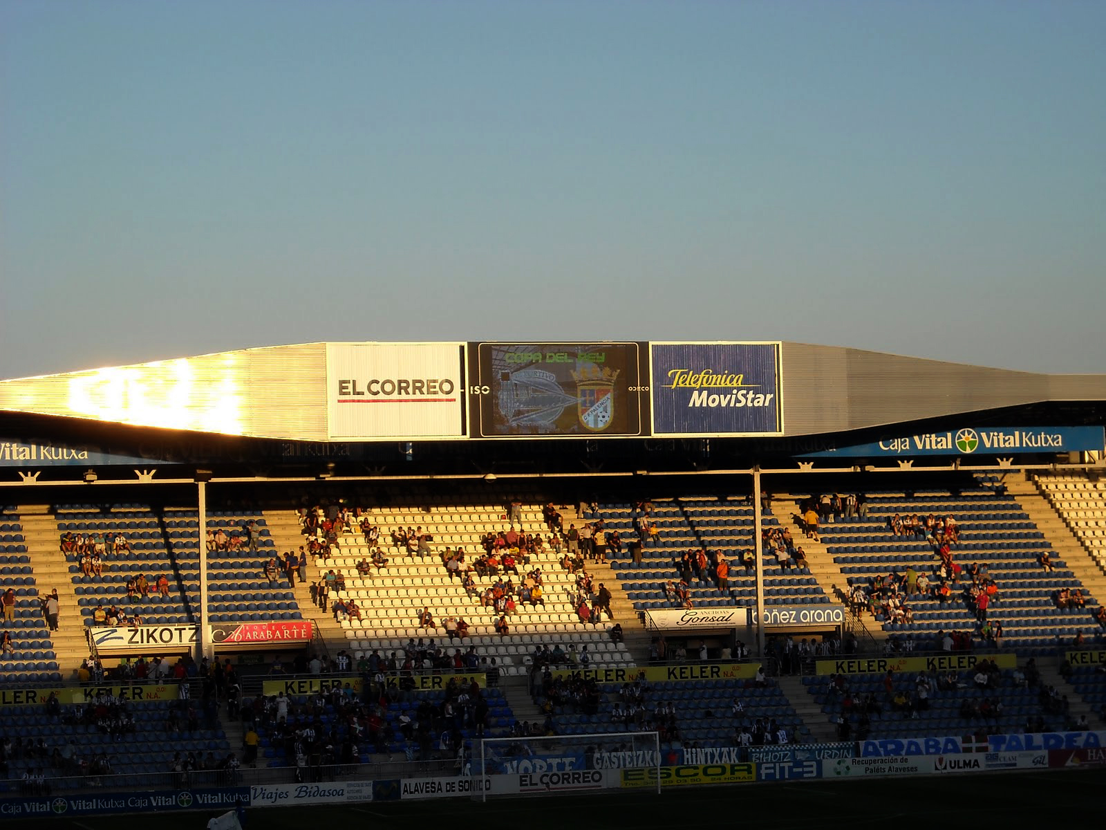 Estadio de Mendizorroza, en Álava